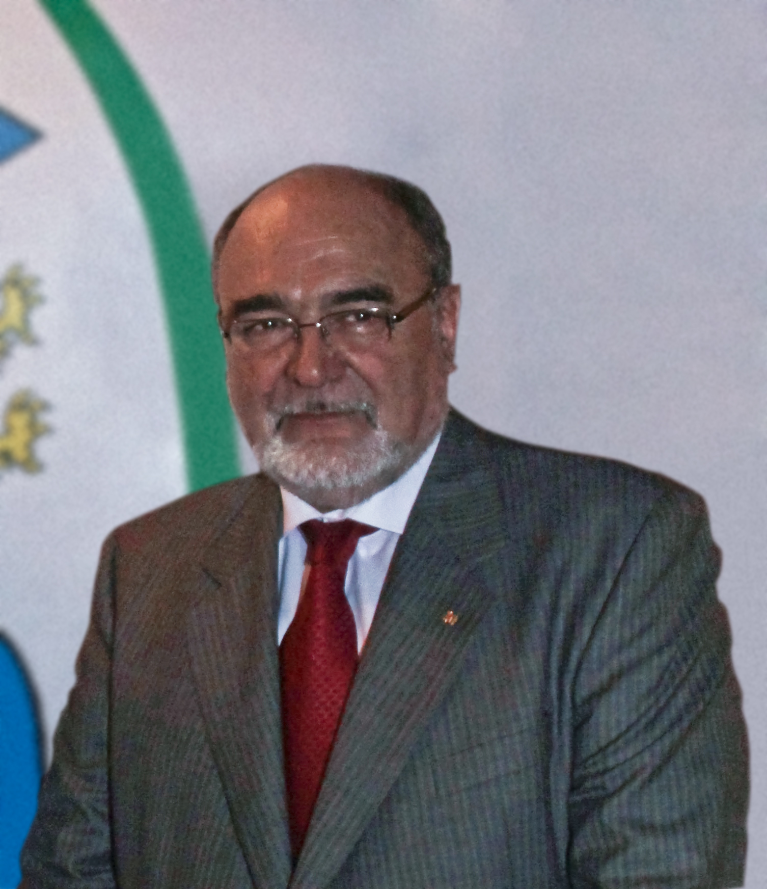 Professor Dr. Abdul Rahman Ashraf, Botschafter der Islamischen Republik Afghanistan in Deutschland